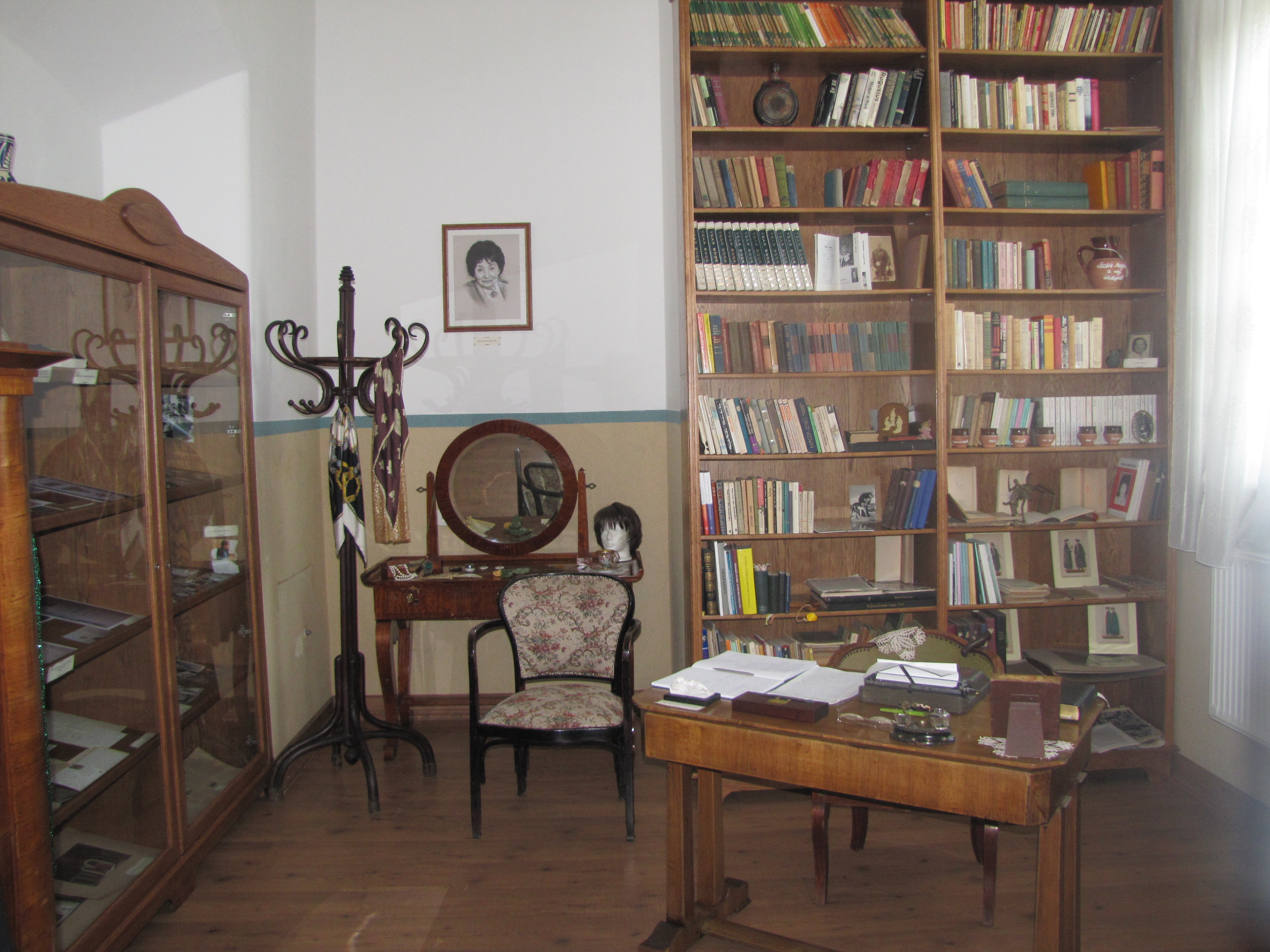 A Szabó Magda emlékszoba (Debreceni Református Kollégium Dóczy Gimnáziuma)